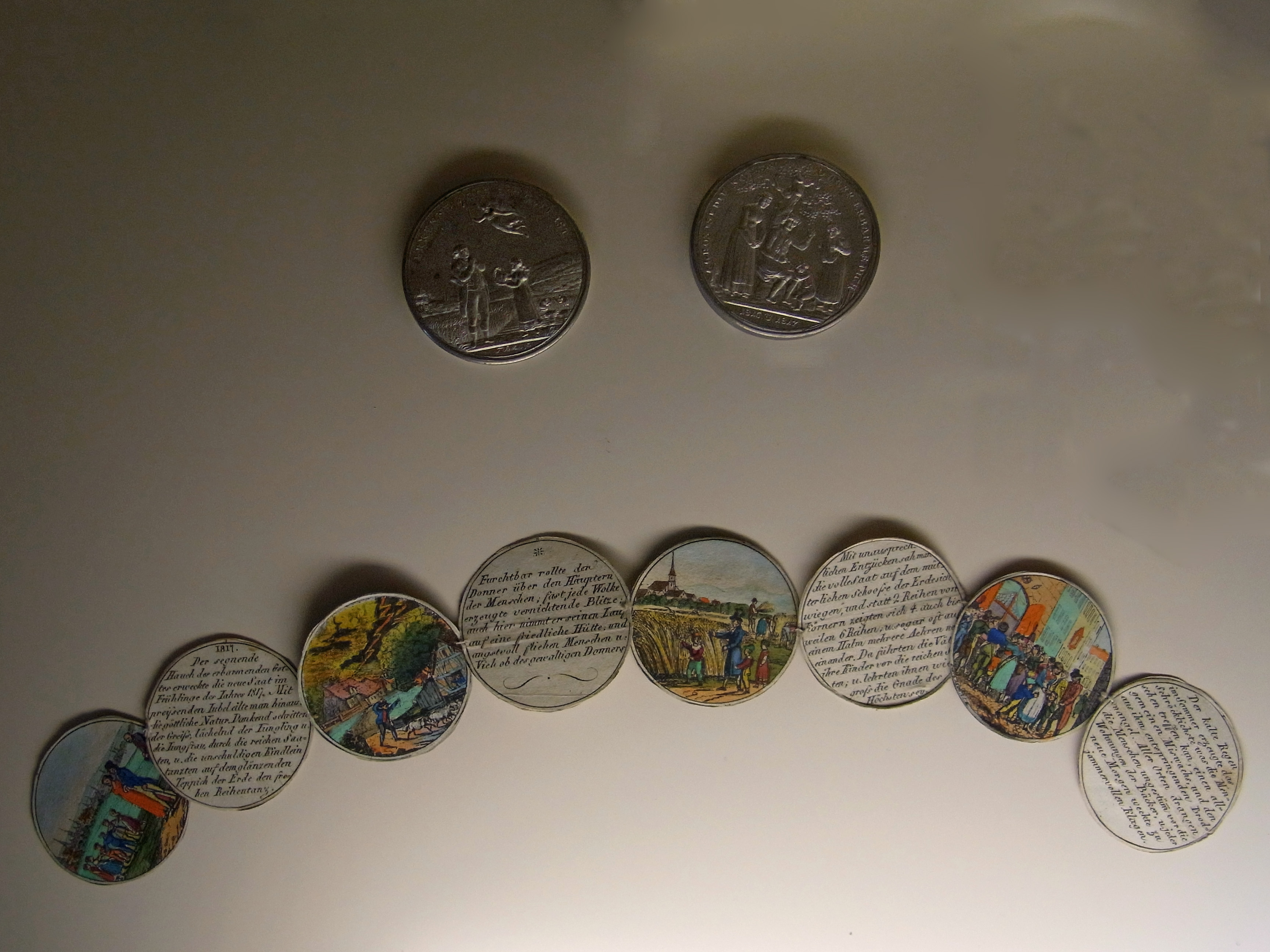 Hungertaler Schraubtaler aus Zinn. Im Inneren Papiertaler, die so angeordnet sind, dass die Vorderseite die Katastrophe von 1815/16 darstellt und die Rückseite die Freude über die Ernte von 1817 aus der Wanderausstellung: "Im Spitzbubenland - Räuberbanden um 1800 in Schwaben" im Wasserschloss Glatt